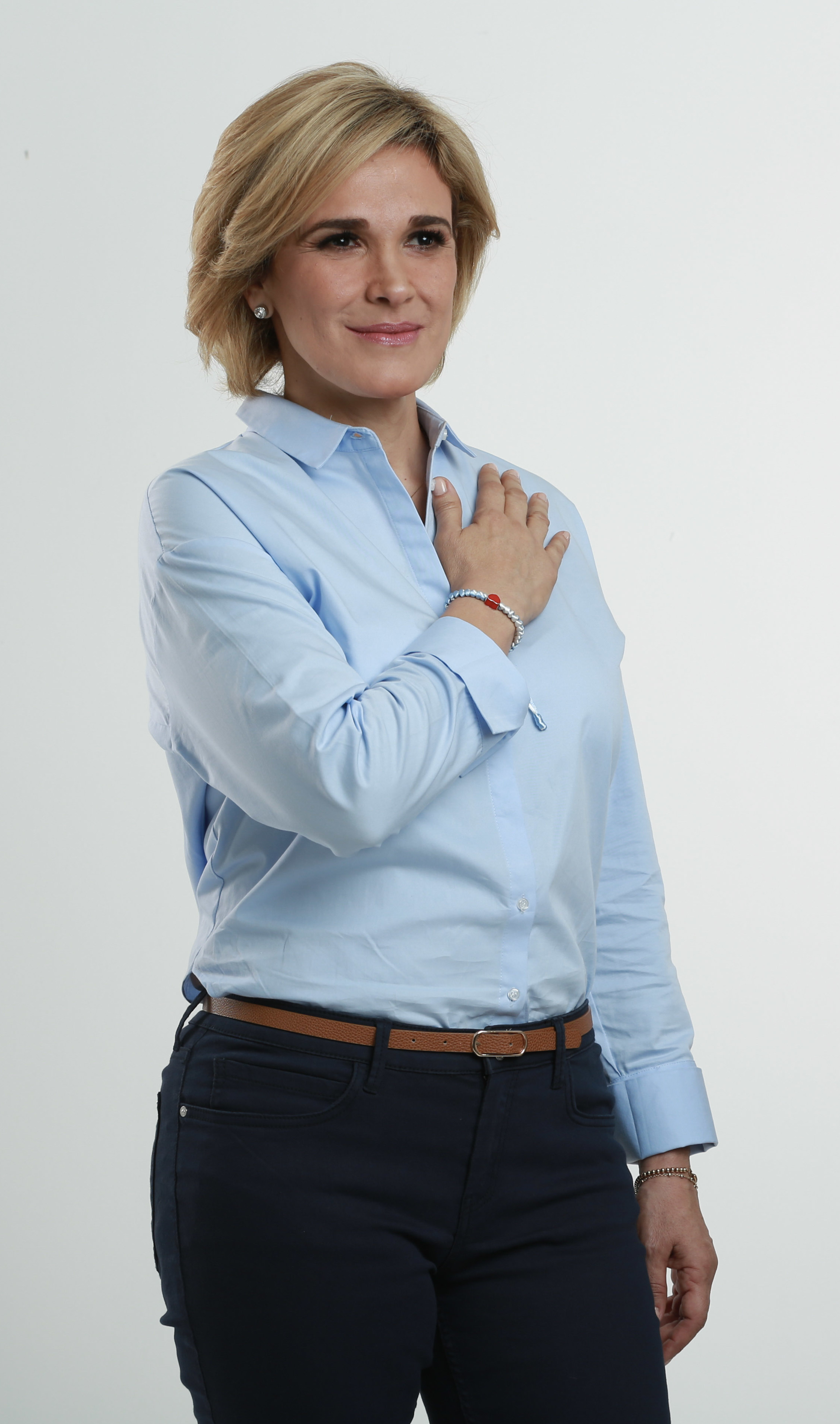 Cynthia Viteri Jiménez en 2018